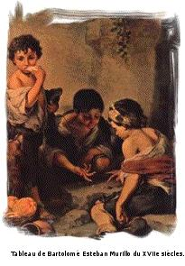 Tableau de Bartolomé Esteban de Murillo datant du XVIIe